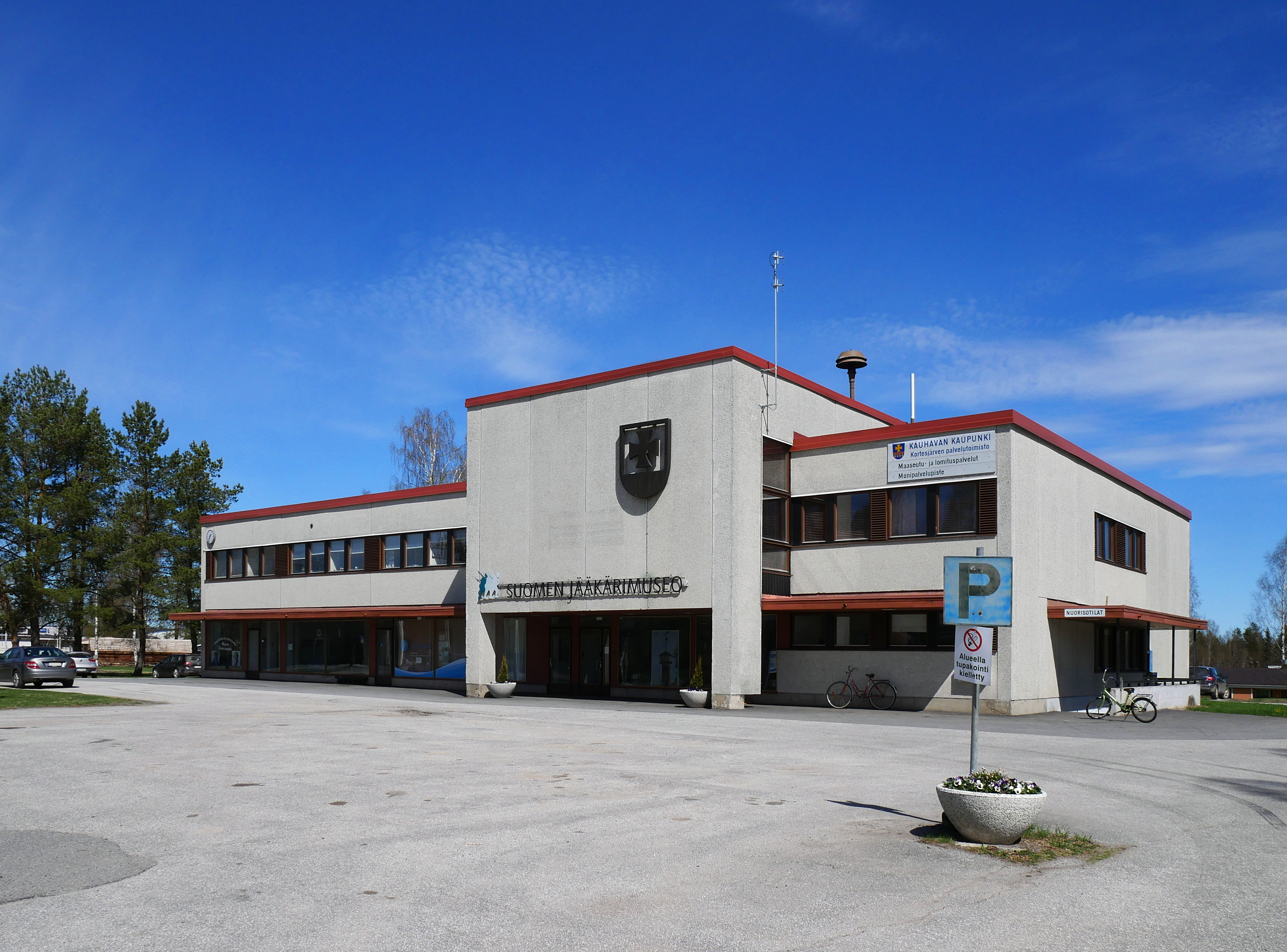 Suomen jääkärimuseo Kortesjärvellä.